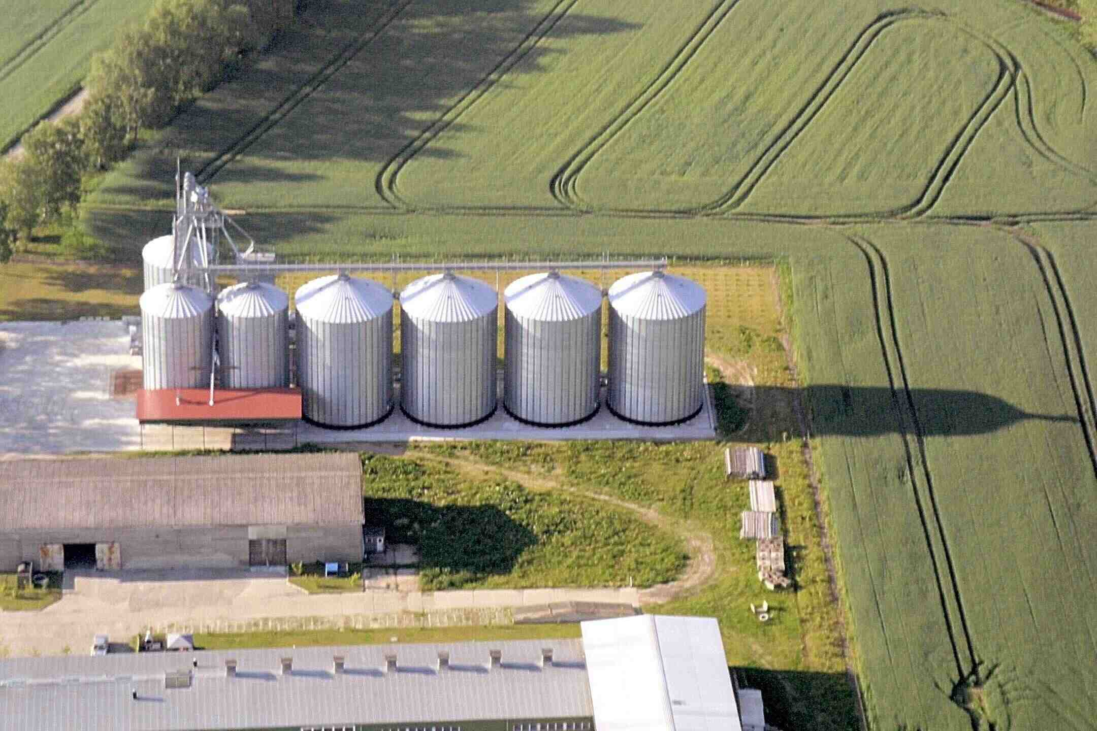 Tempat penyimpanan hasil panen berupa biji-bijian